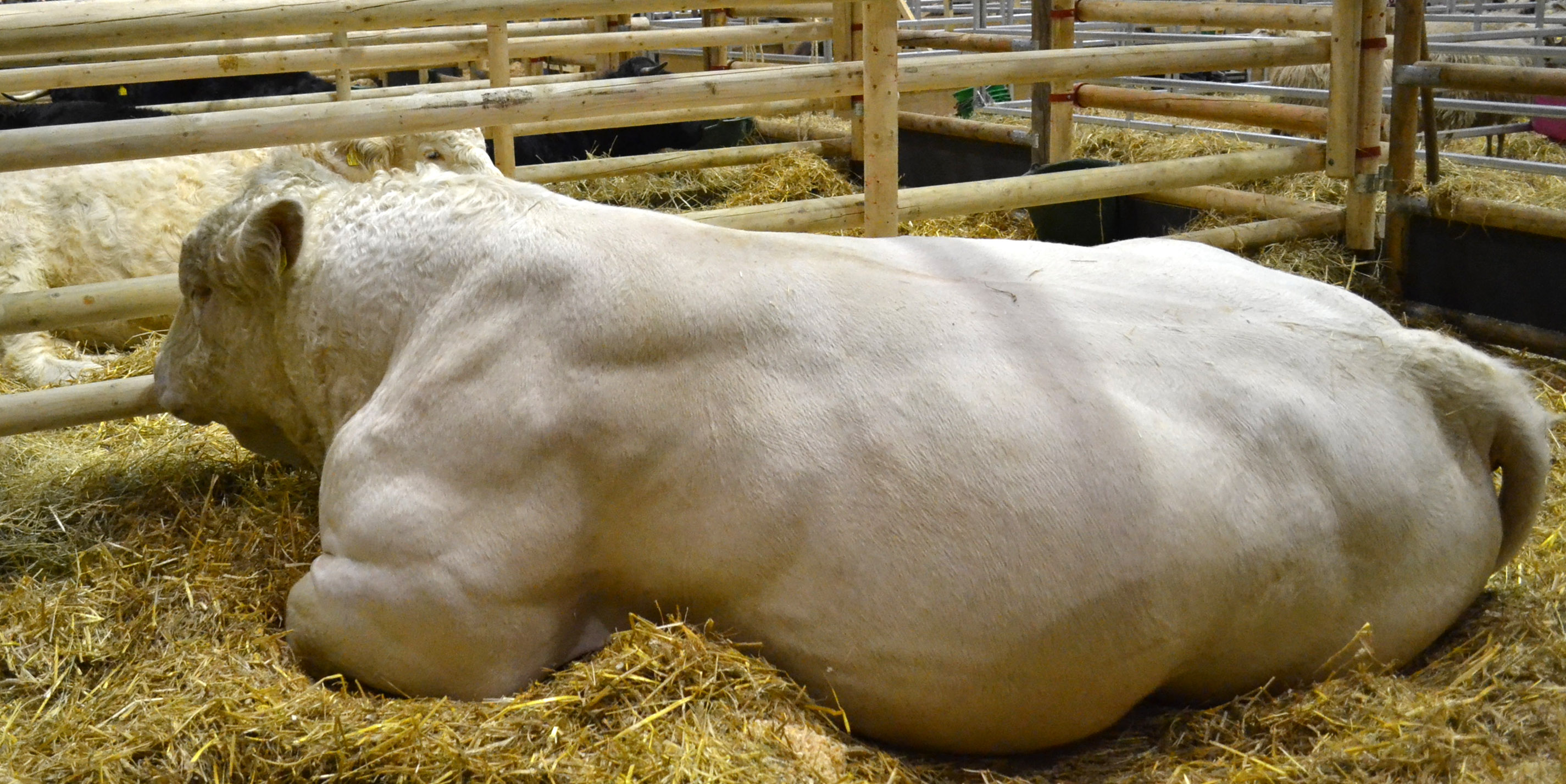 Ausstellungsbulle der Uckermärker Rinderrasse, auf der Grünen Woche 2014 aufgenommen